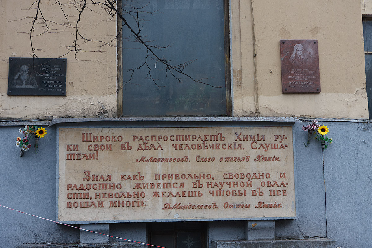 лабораторный корпус НИФХИ им. Л.Я. Карпова: табличка; 15.04.2012